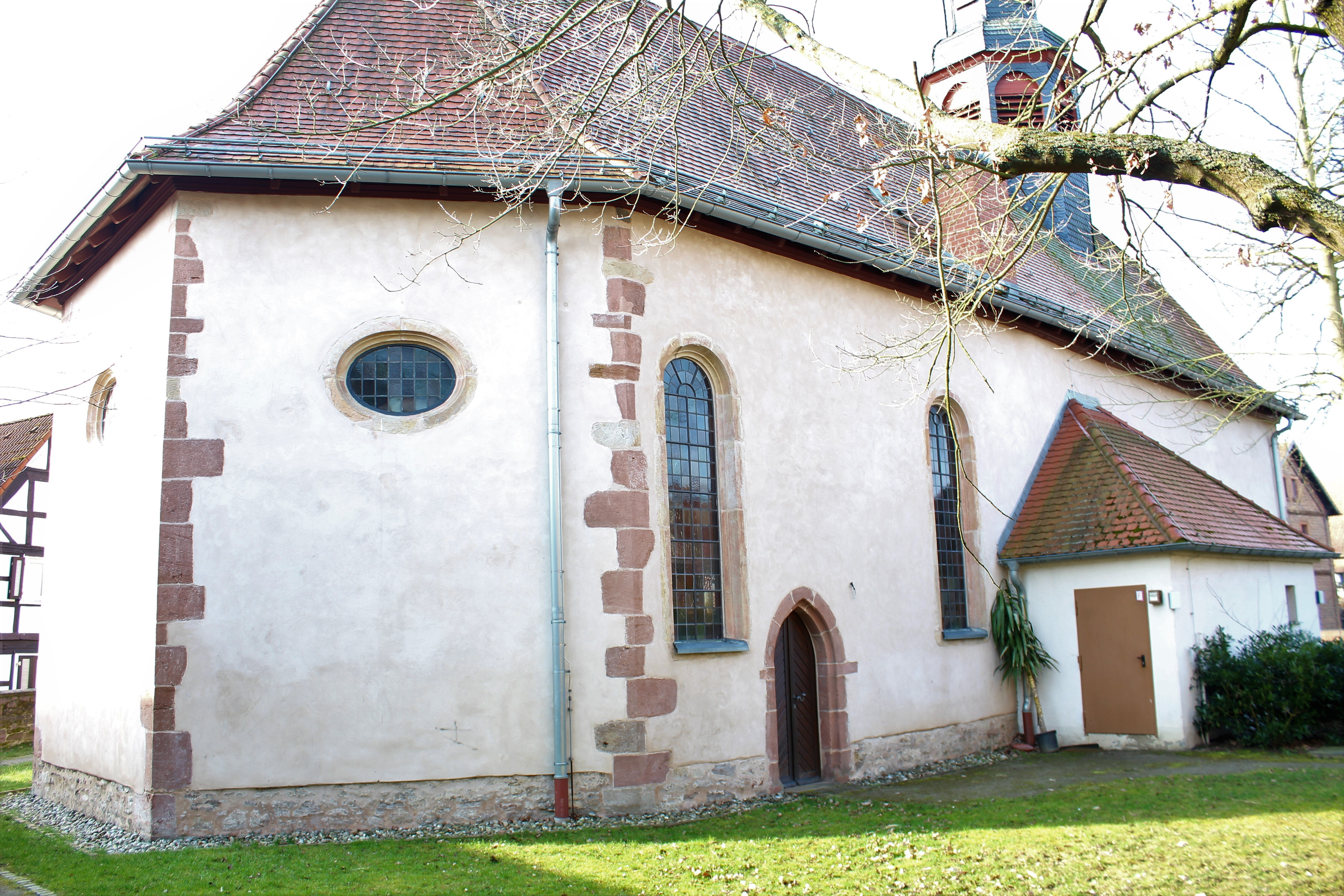 Evangelische Kirche Eichen (Nidderau), Main-Kinzig-Kreis, Hessen, Deutschland